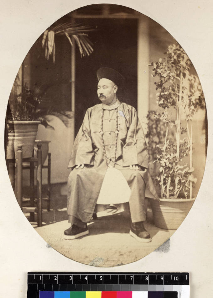 戶部尚書肅順